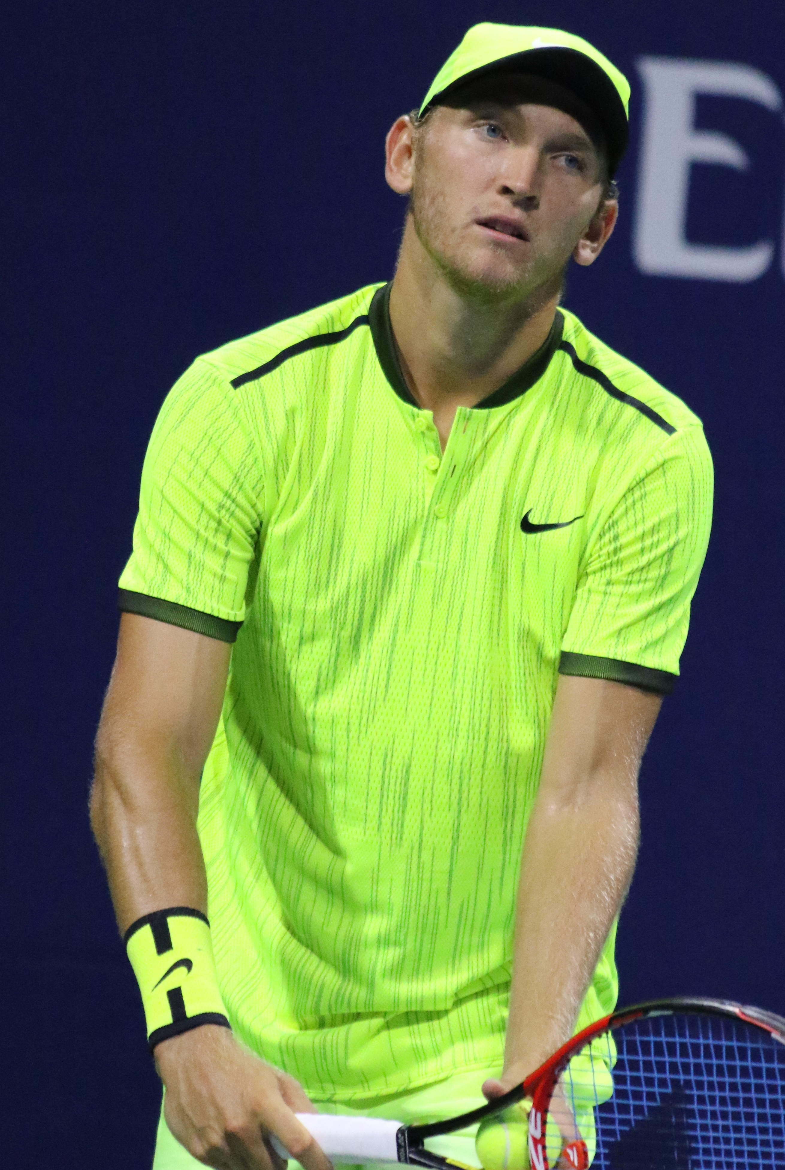 Krueger US16 (4)